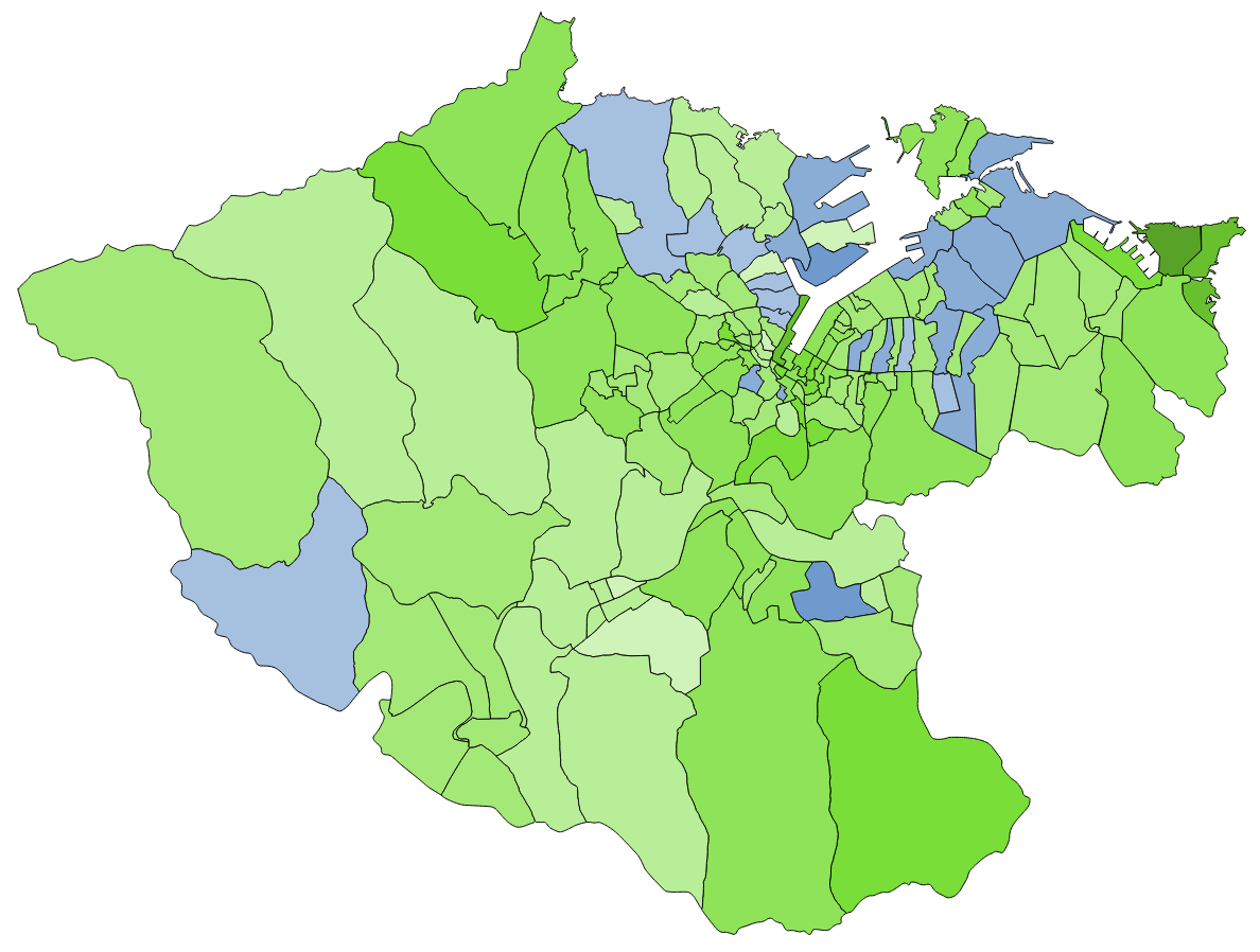 顏色對照表